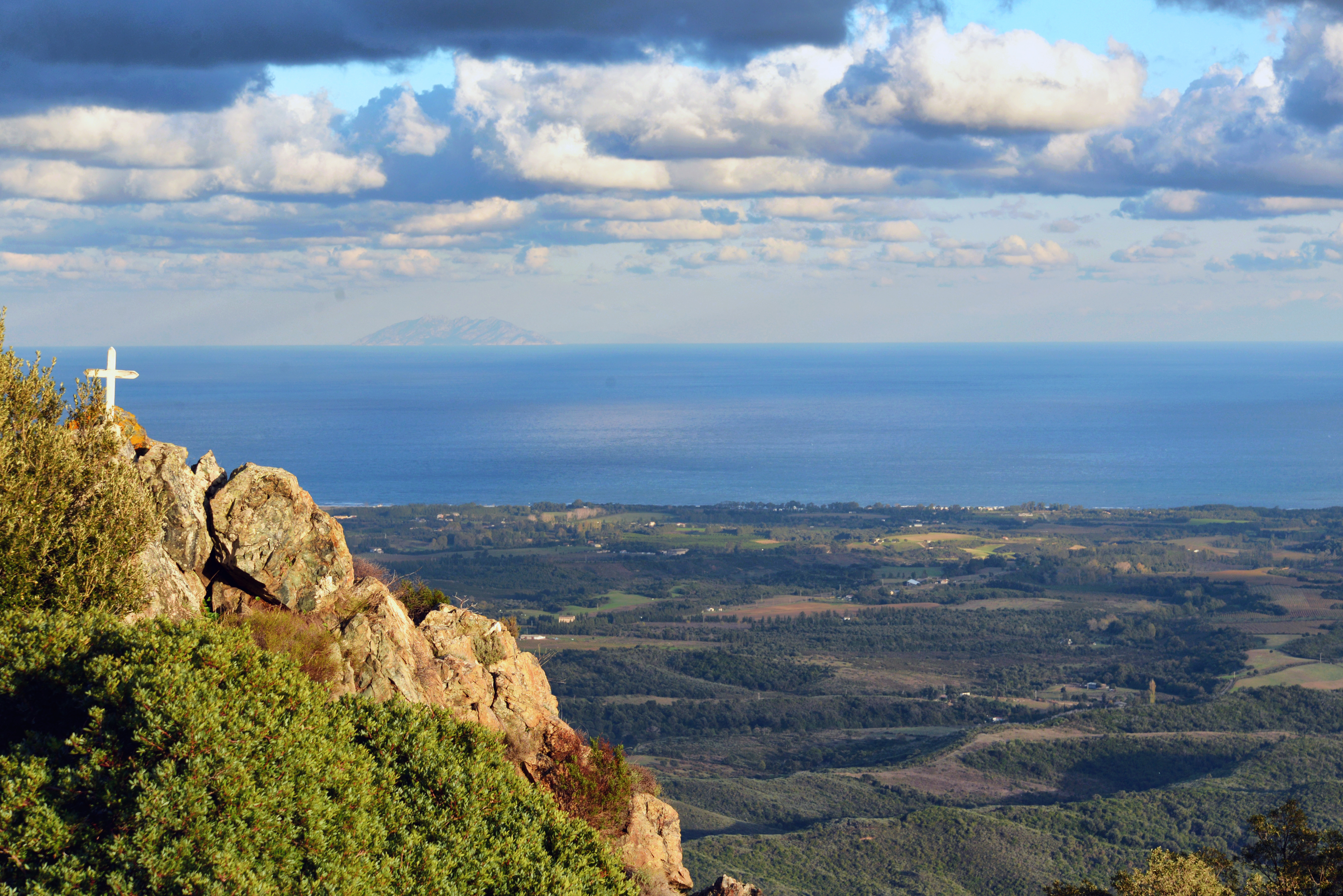 Tox, Costa Verde (Corse) - La plaine de Linguizzetta et l'île de Montecristo vus depuis la chapelle Notre-Dame des Grâces (538 m d'altitude)